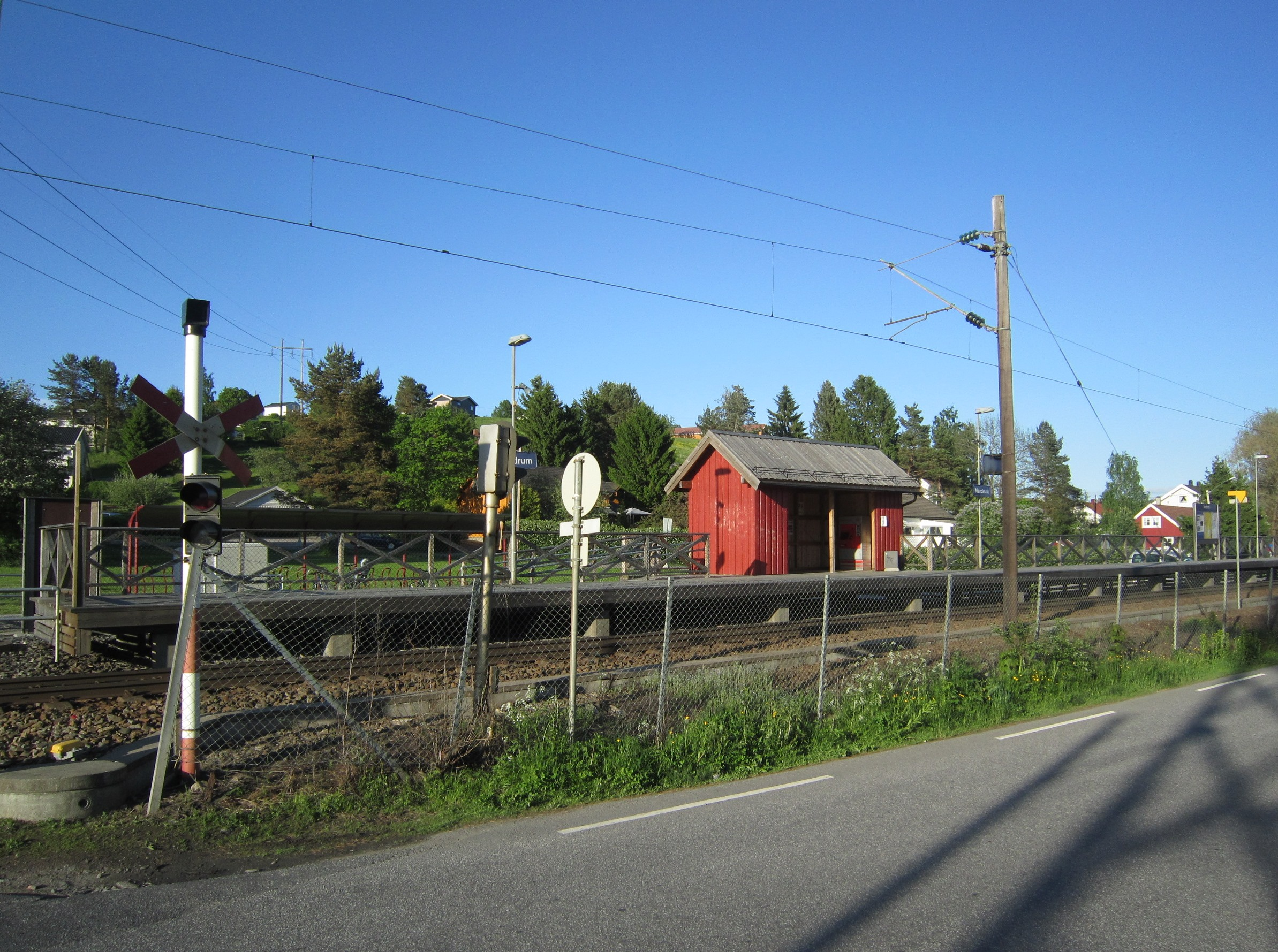 Nerdrum holdeplass på Kongsvingerbanen